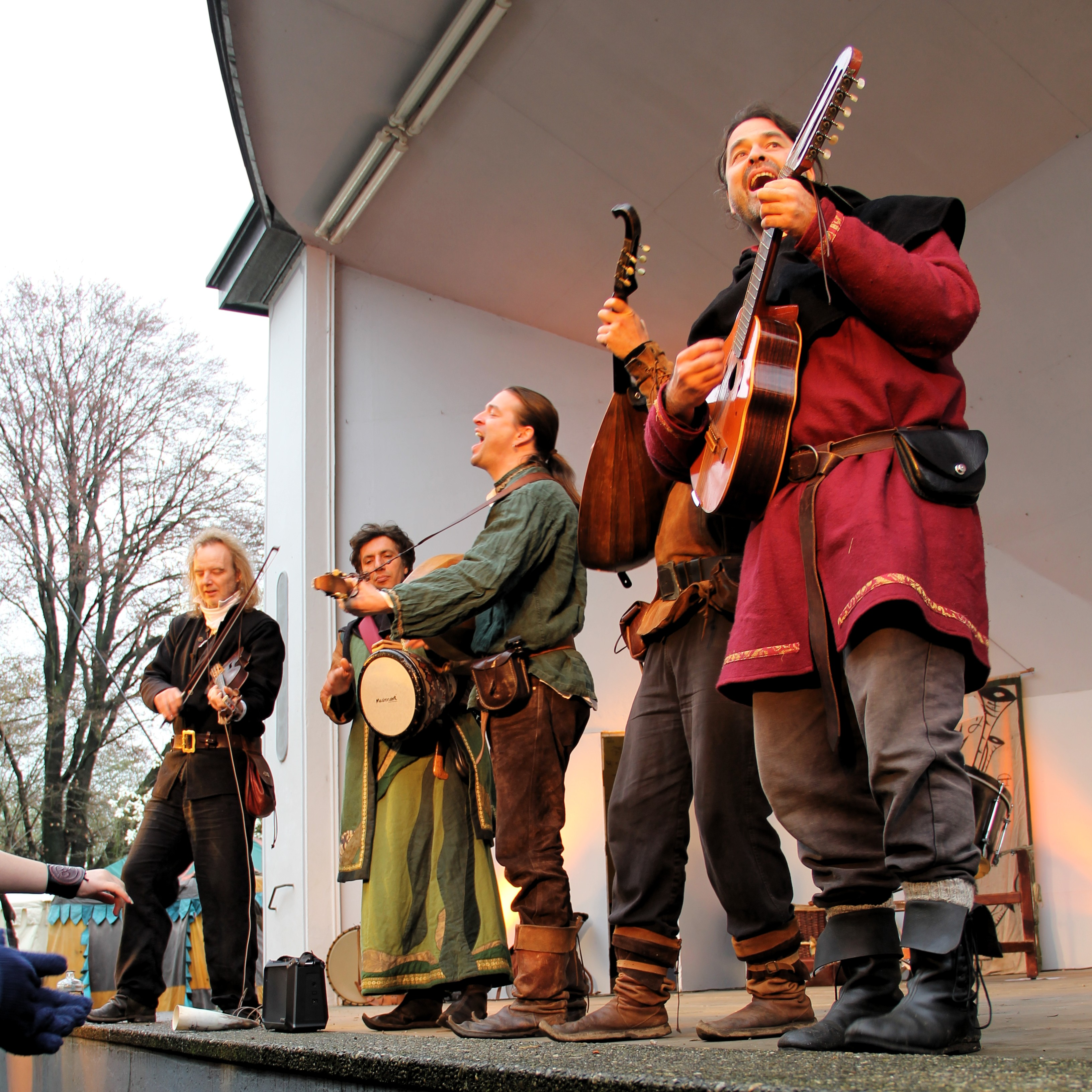 Die Streuner in Badsäckingen 2013